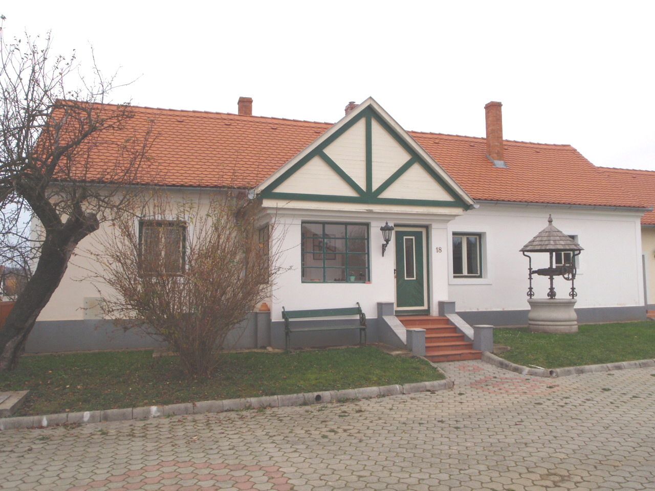 Magyarszombatfa Fő utcai porta